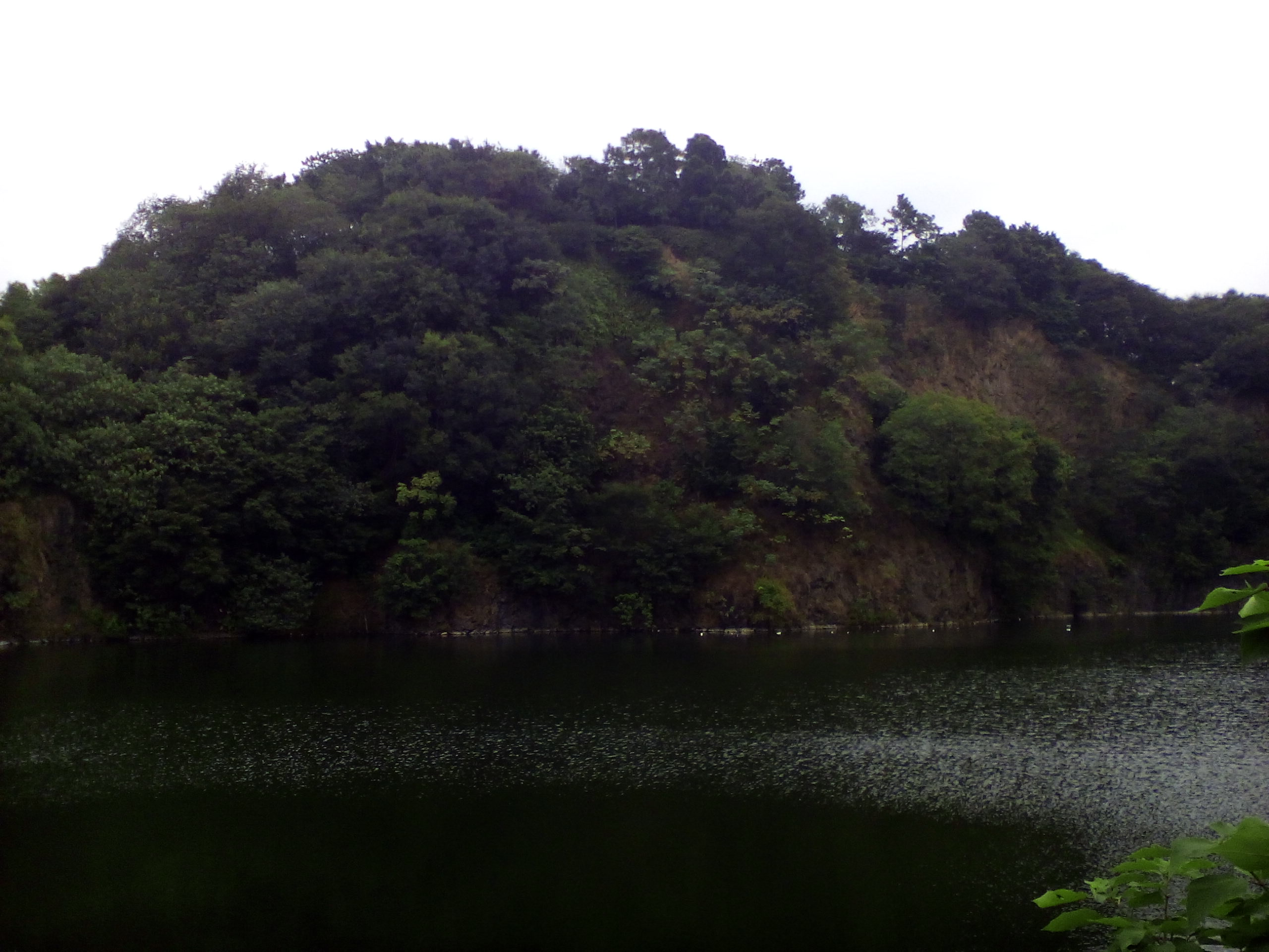 Central lake, Wangjiegang Park in Chancheng District, Foshan City, Guangdong Province, China